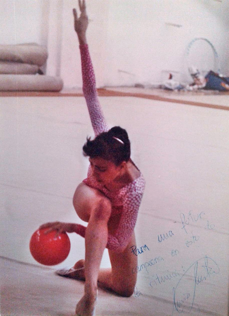 La gimnasta rítmica española María Martín Rodríguez (del Club Moscardó) en 1986 en el Gimnasio Moscardó.